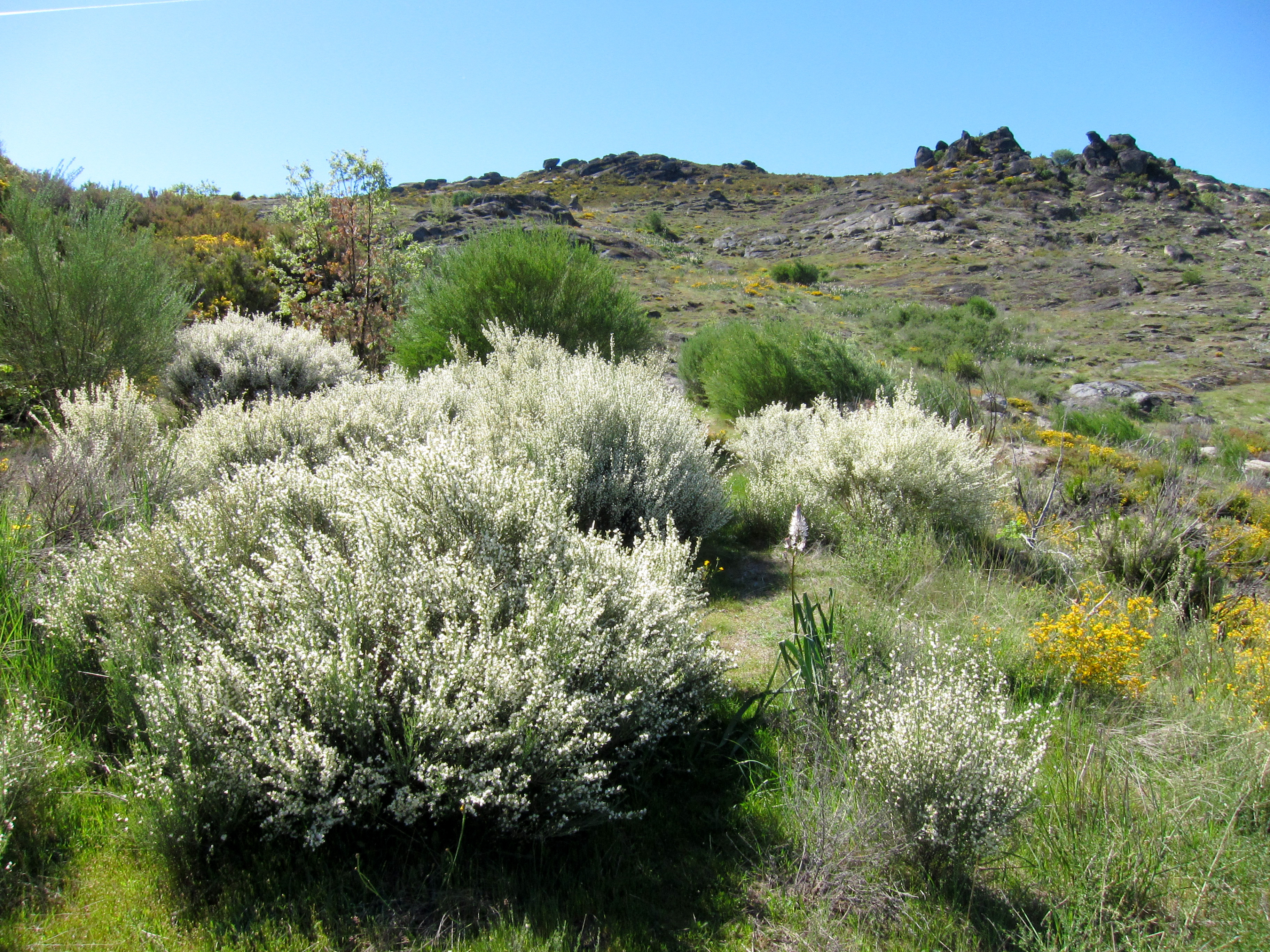 Parque Natural de Montesinho Porto Furado trail